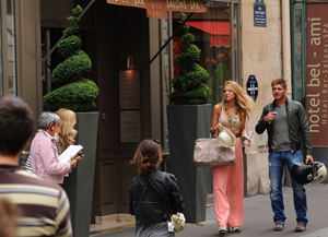 Réalisation de série Gossip girl à Paris Saint Germain des Prés